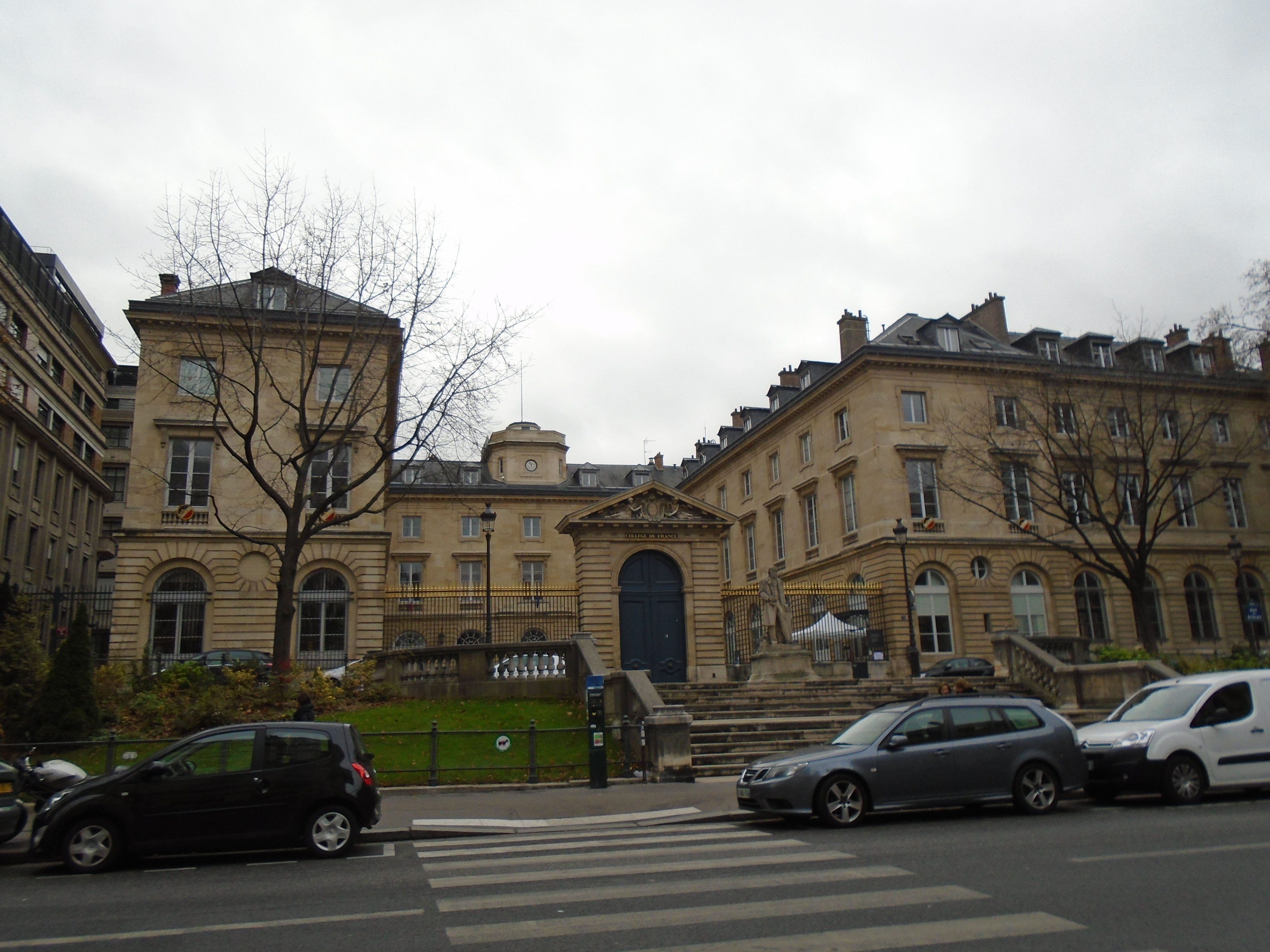 Collège de France @ Paris